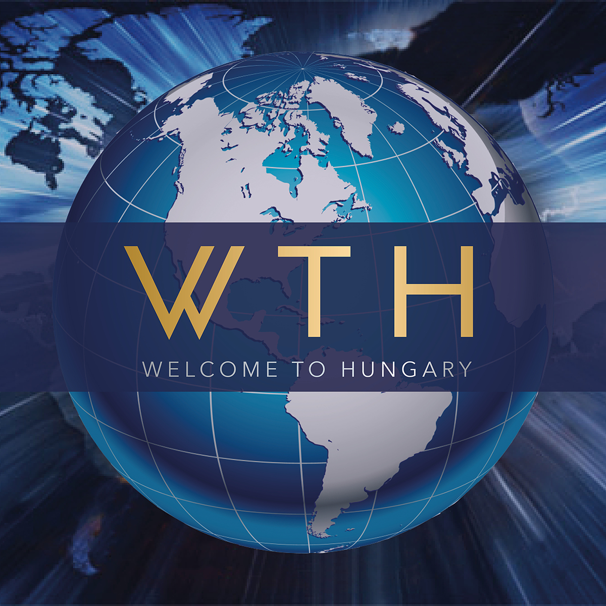 WTH logó, főcím